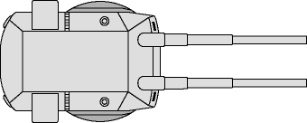 Vista dall'alto delle torrette B,C,D